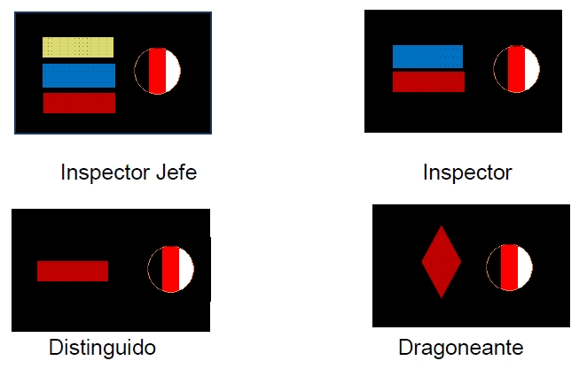 Presillas para el personal de sub-oficiales y dragoneantes en uniforme de calle del cuerpo de custodia y vigilancia nacional del INPEC